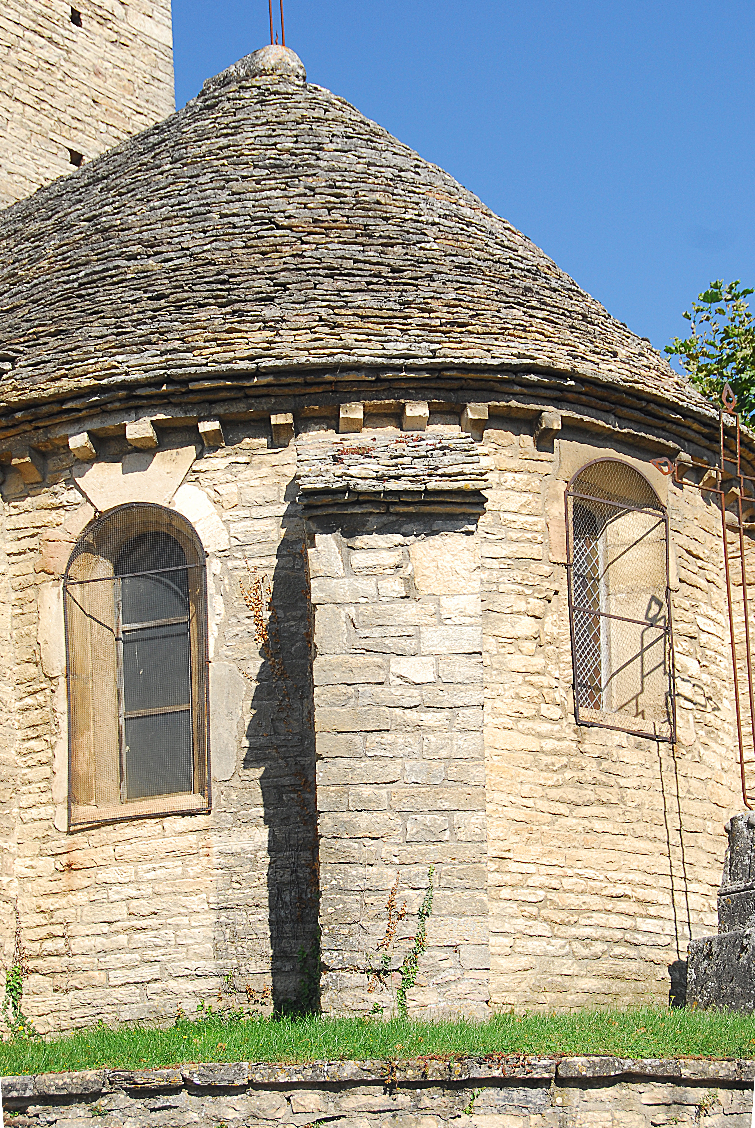 St-Basrthélémy,Farges, Chor von SO